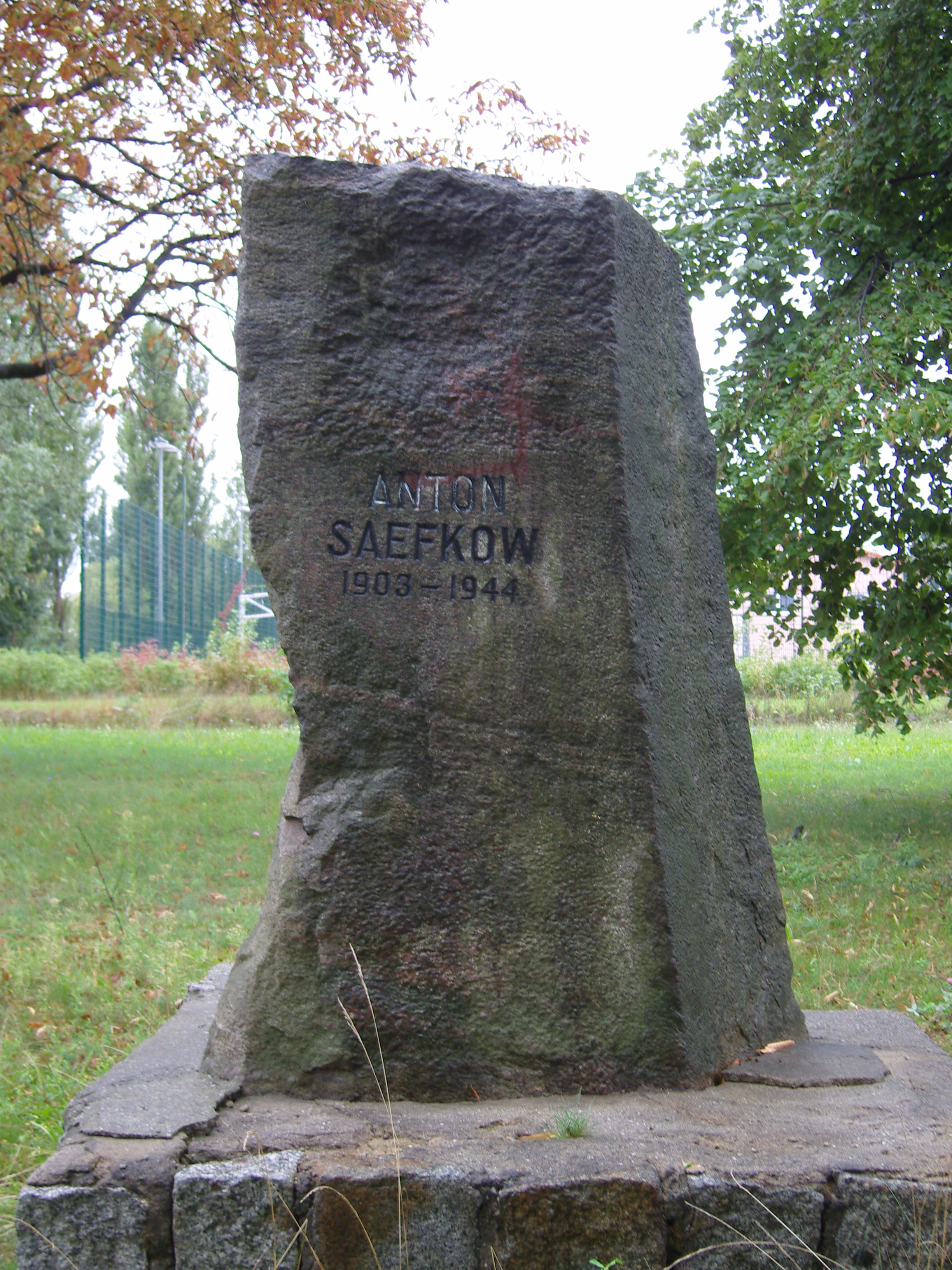 Gedenkstein für Anton Saefkow im Innenhof der Dr.-Otto-Rindt-Oberschule in Senftenberg